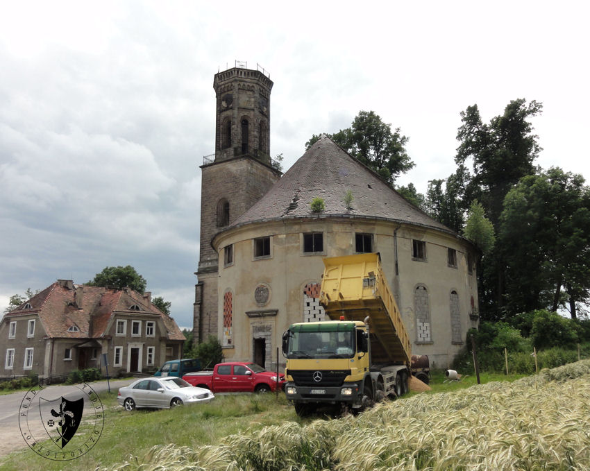 Żeliszów - kościół ewangelicki, 1796-1797, 1873-1877, pierwsza faza odbudowy